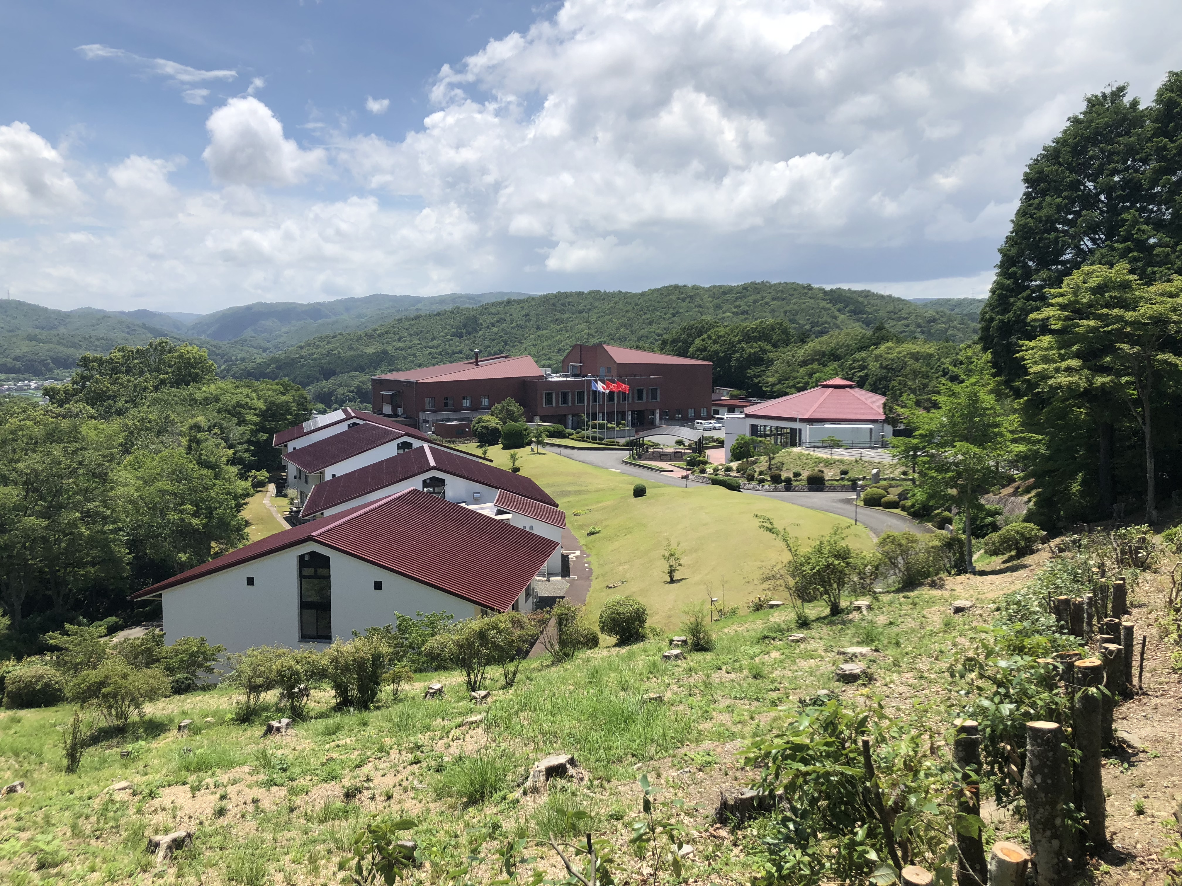 UAゼンセン中央教育センター「友愛の丘」